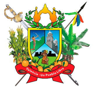 Gobernación de Carabobo